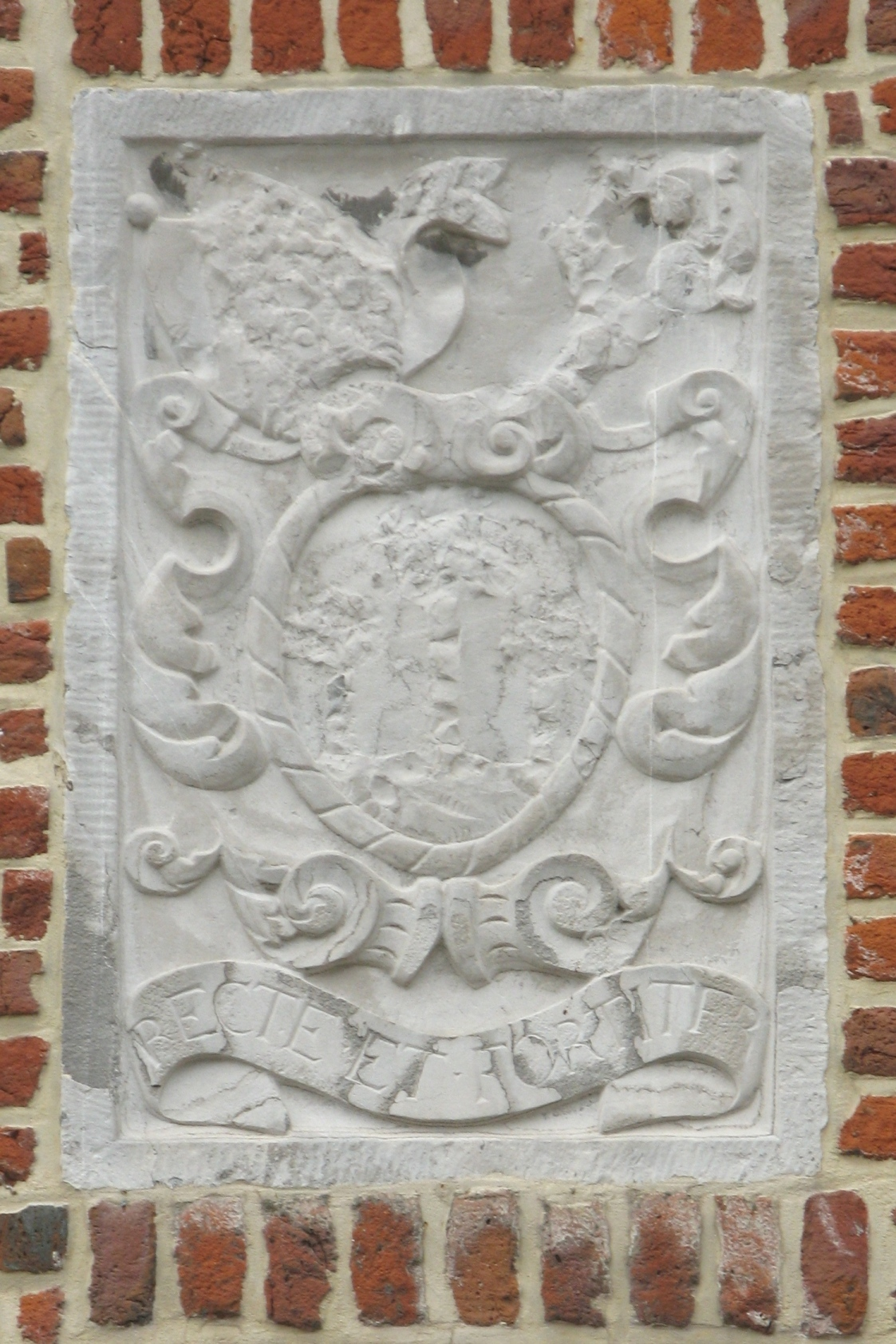 Moinerie: Wope vum Jean Dubois, Abt am Val-Dieu um Nordgebai banne vum Haff aus ze gesinn. Kategorie:Provënz Léck